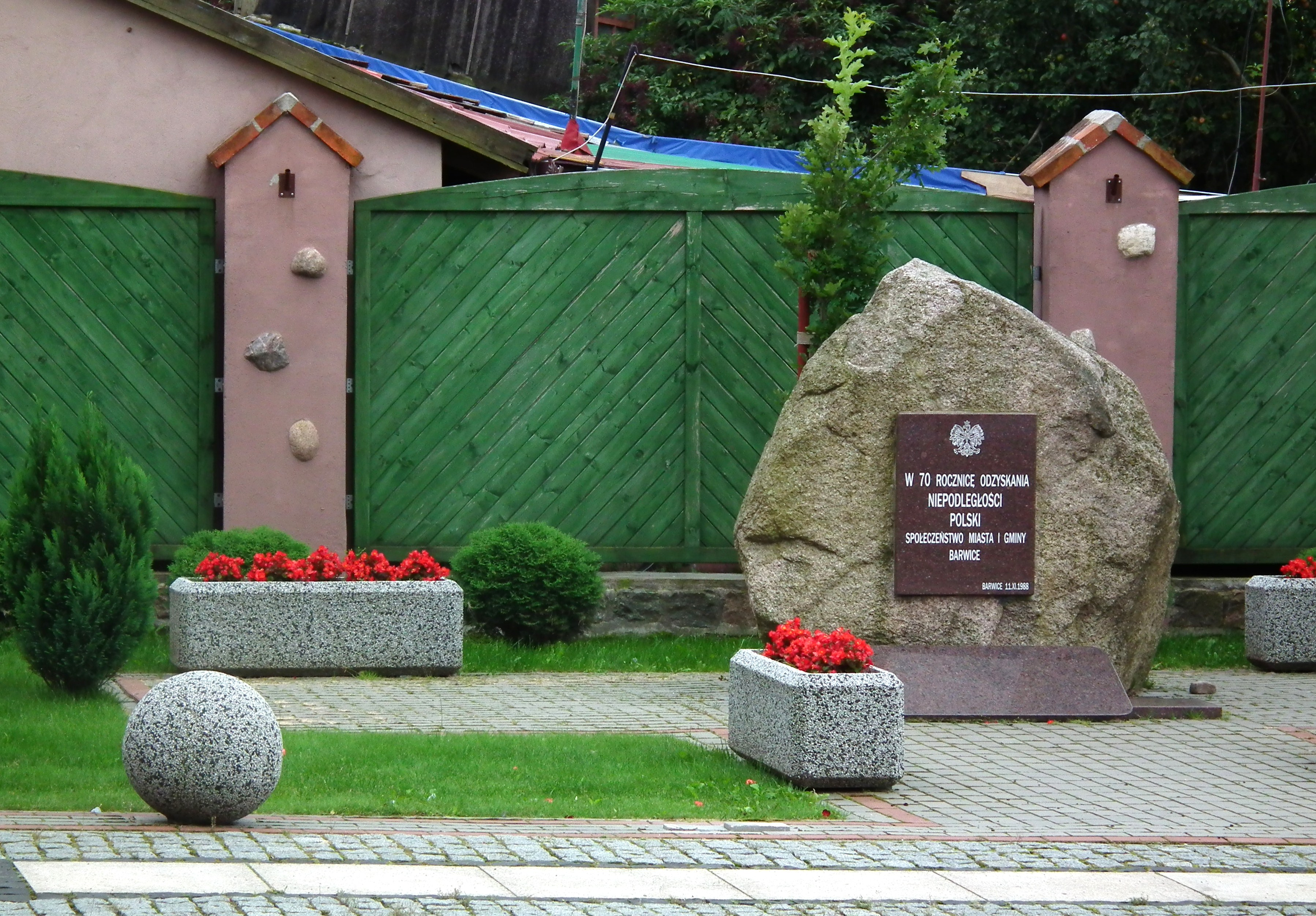 Pomnik przy kościele w Barwicach.